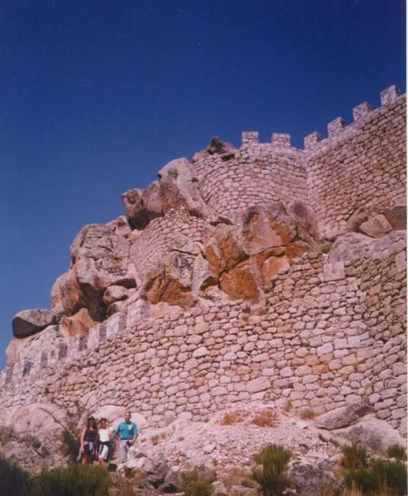 Castillo de Manqueospese (Ávila, España)